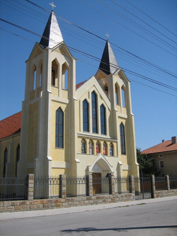 Католическата църква „Свети Андрей“ в село Калояново, Пловдивско.